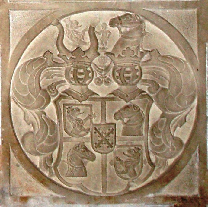 Hegnenberg_Familienwappen_Grabstein_(1694)_in_der_Kirche_von_Oberdolling,_Landkreis_Eichstätt